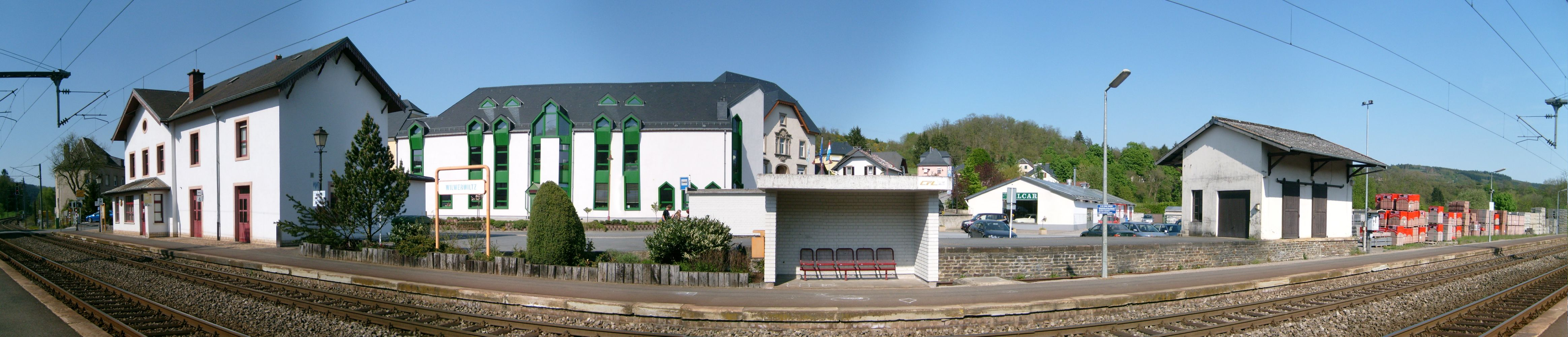 D'Gare Wëlwerwolz, 9. Mee 2008.